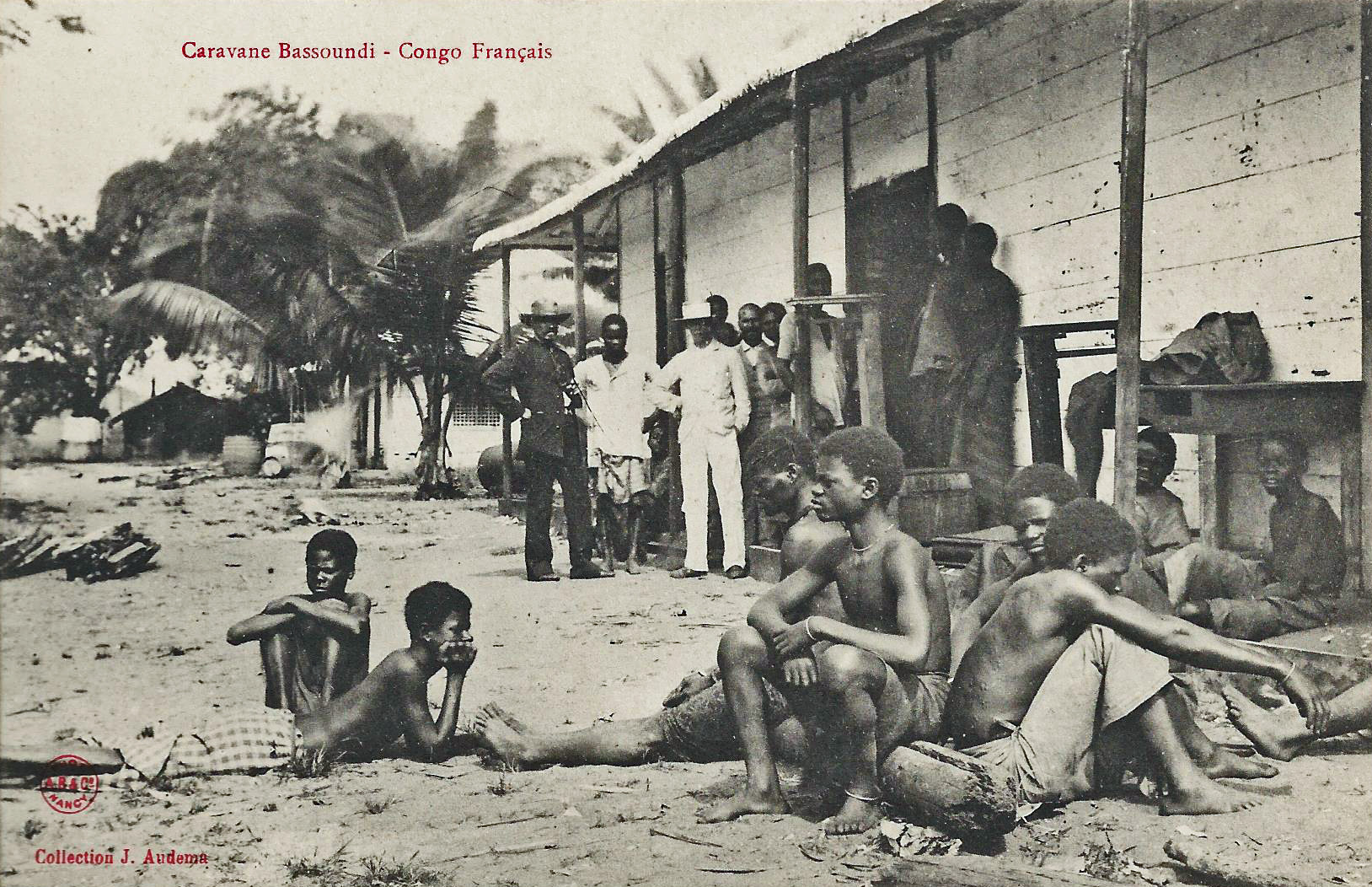 Caravane Bassoundi. Congo Français. Collection J. Audema. Phot. A.B. & Cie, Nancy [Albert Bergeret] Congo Français